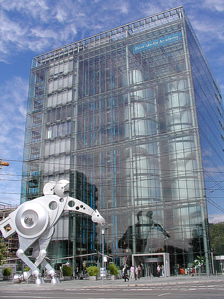 Print Media Academy, Office and Seminar Building of Heidelberger Druckmaschinen AG in Heidelberg